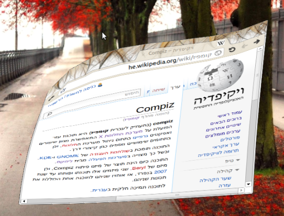 אפקט בקומפיז המנדנד את החלון בעת הזזתו